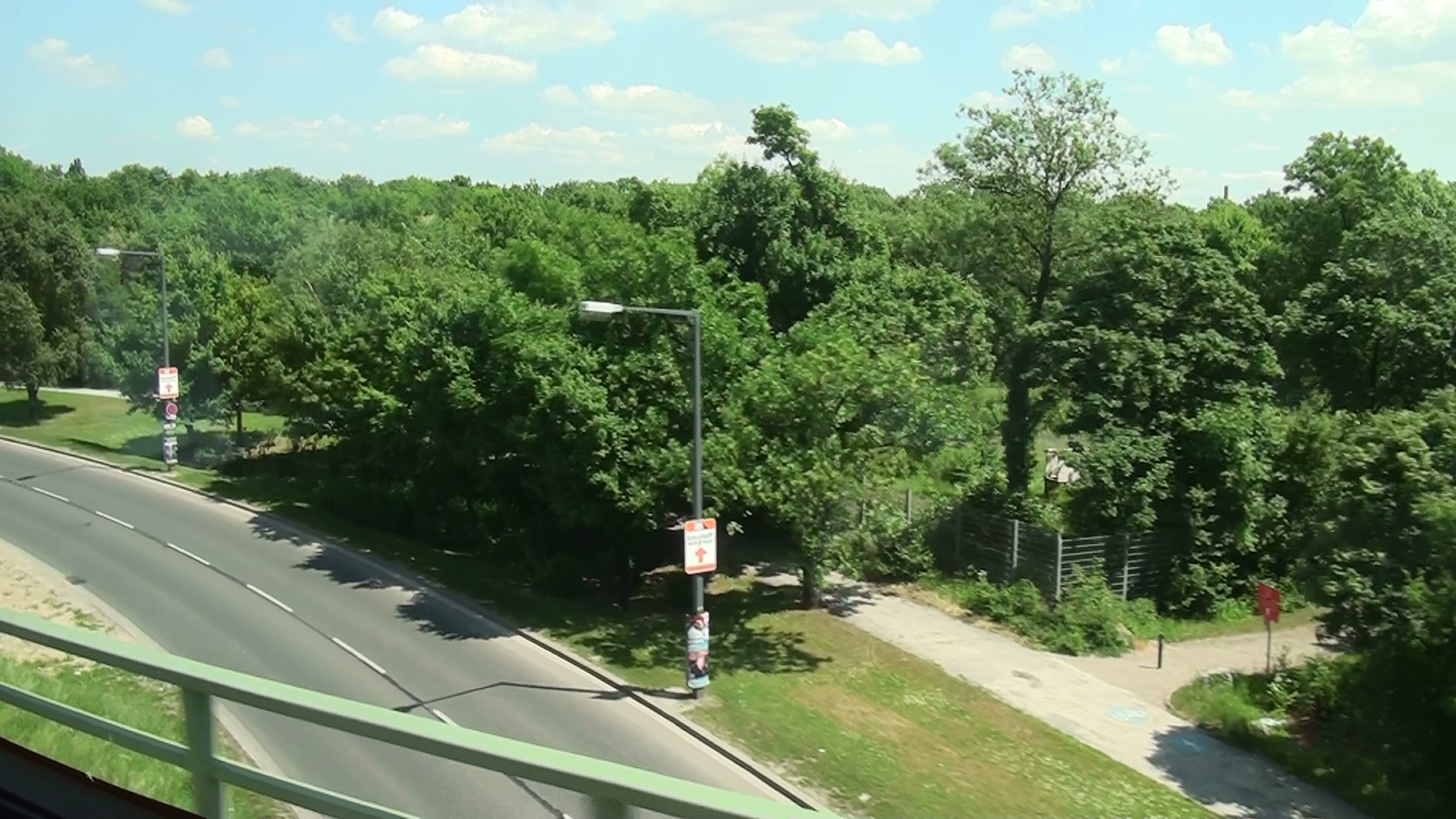 真是维也纳森林